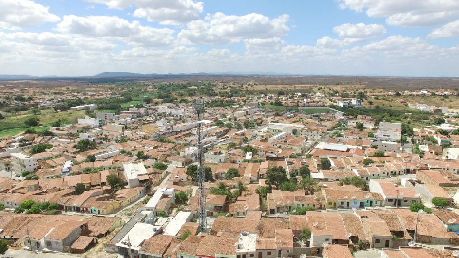 Foto tirada por drono